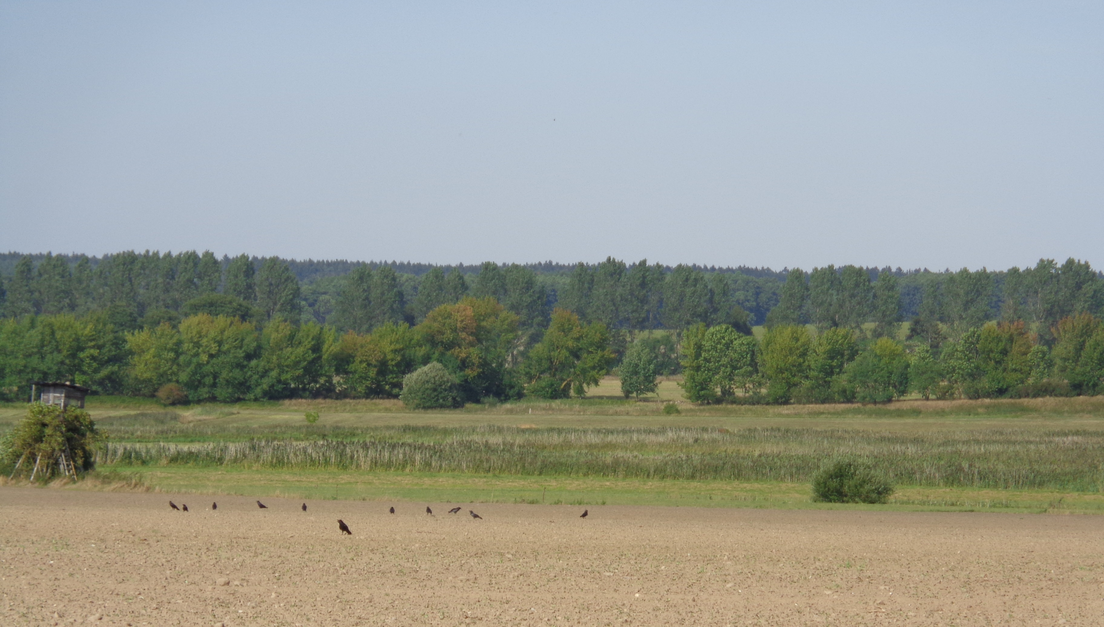 Verlandender Wangeliner See im Naturschutzgebiet Wangeliner See